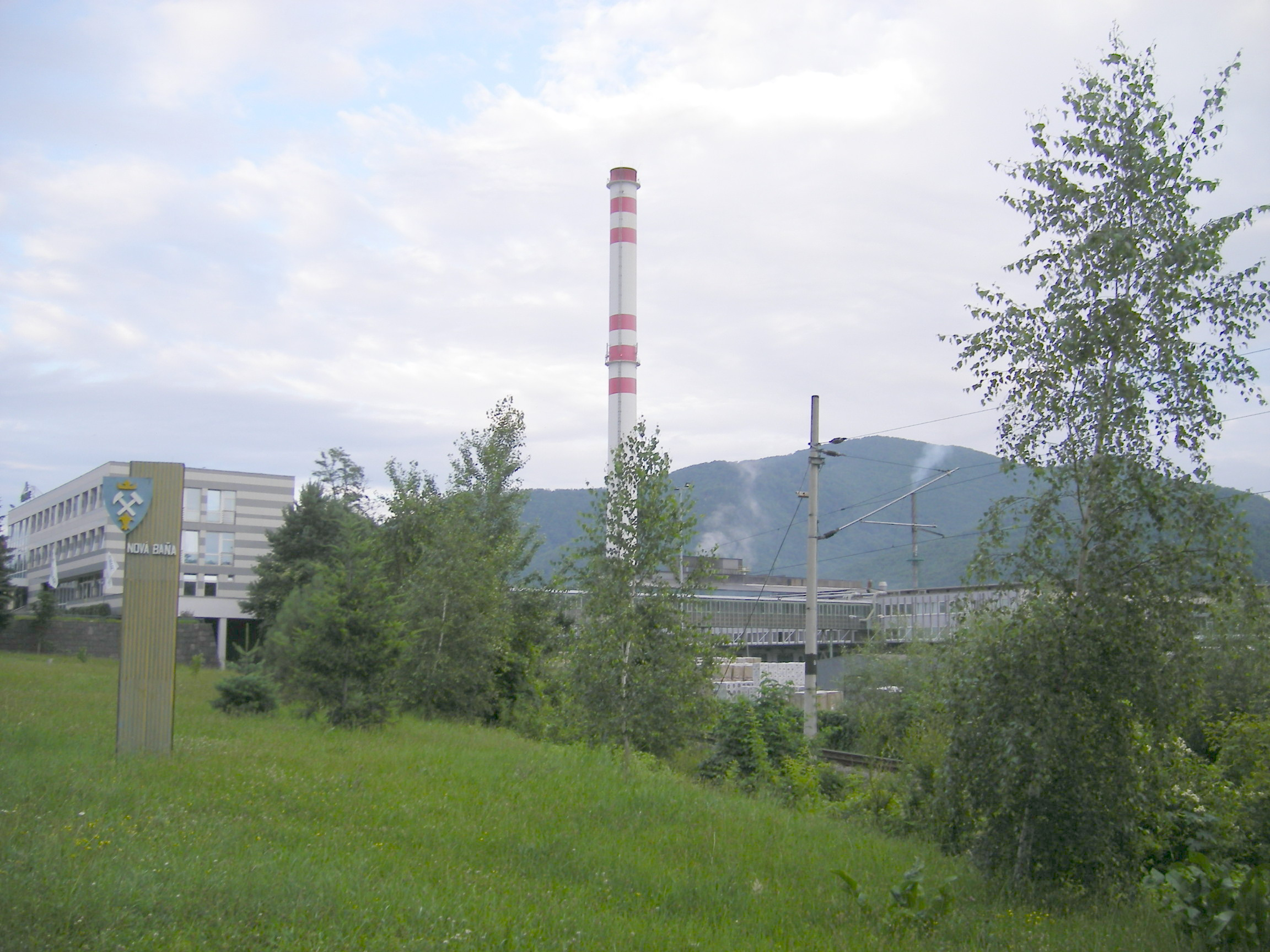 Nová Baňa (okres Žarnovica)